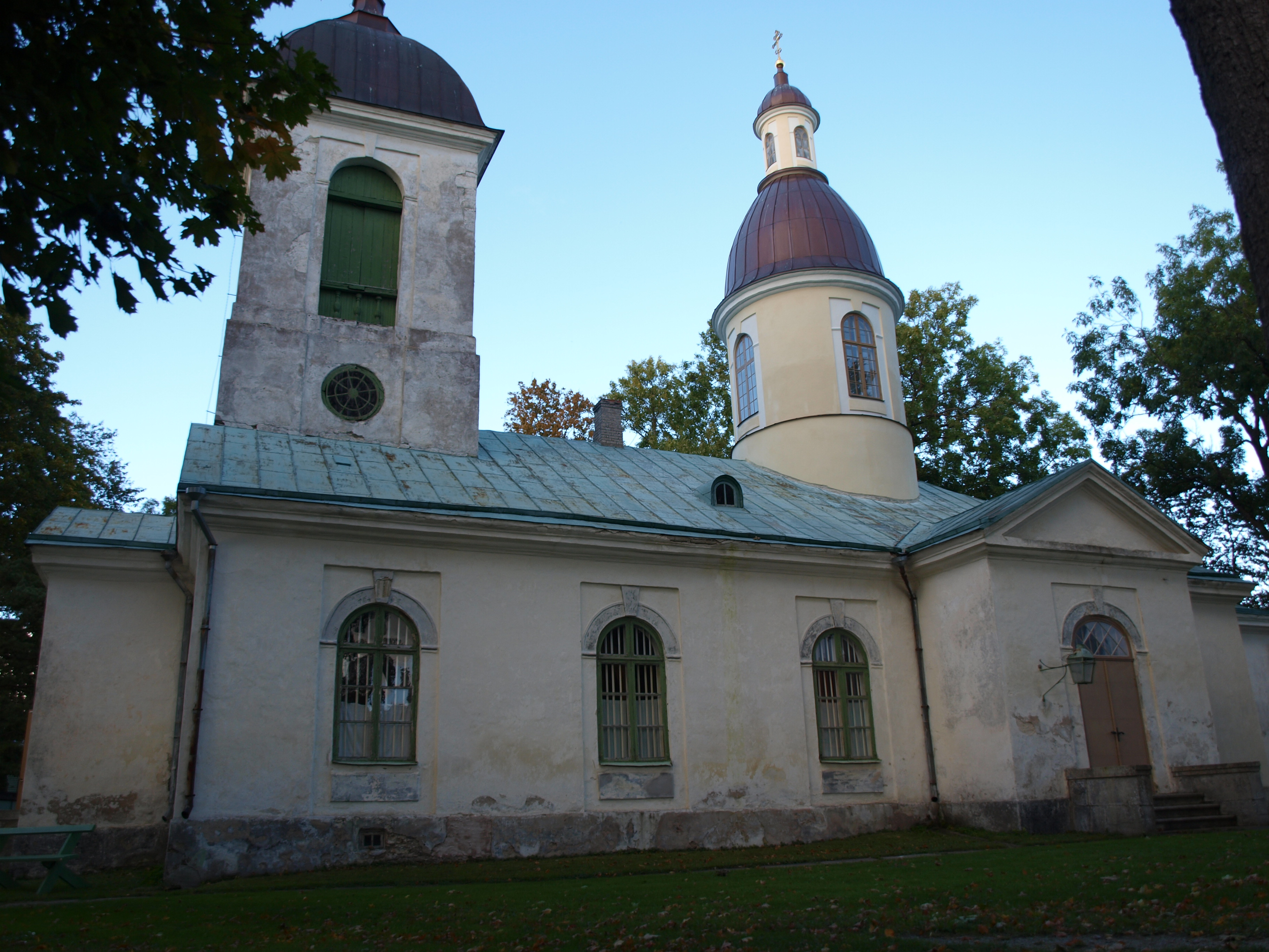 Kuressaare Püha Nikolai kirik on õigeusu kirik Kuressaares. Kirik ehitati 1790. aastal. Kirikul on kaks torni, mis õigeusu traditsioonis tähistavad Kristuse kahte loomust: jumalikku ja inimlikku.